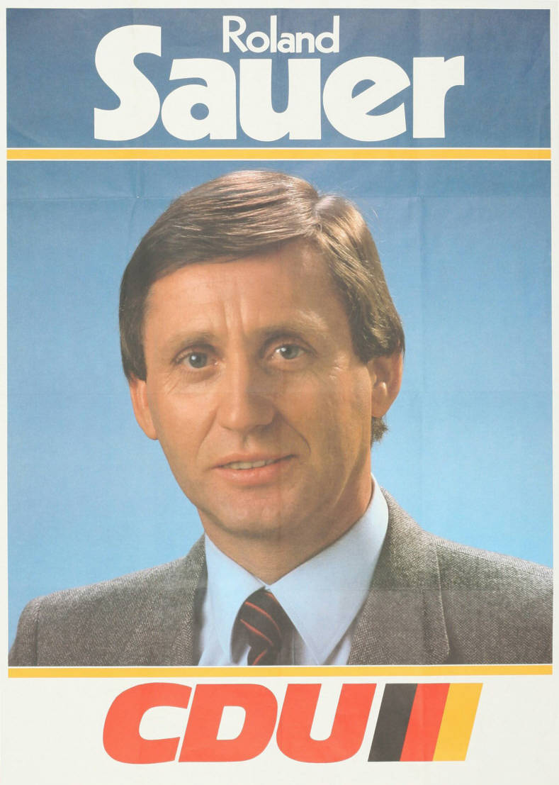 Roland Sauer CDU Abbildung: Porträtfoto Plakatart: Kandidaten-/Personenplakat mit Porträt Objekt-Signatur: 10-001: 2660 Bestand: Plakate zu Bundestagswahlen (10-001) GliederungBestand10-18: Plakate zu Bundestagswahlen (10-001) » Die 10. Bundestagswahl am 6. März 1983 » CDU » Mit Porträtfoto Lizenz: KAS/ACDP 10-001: 2660 CC-BY-SA 3.0 DE